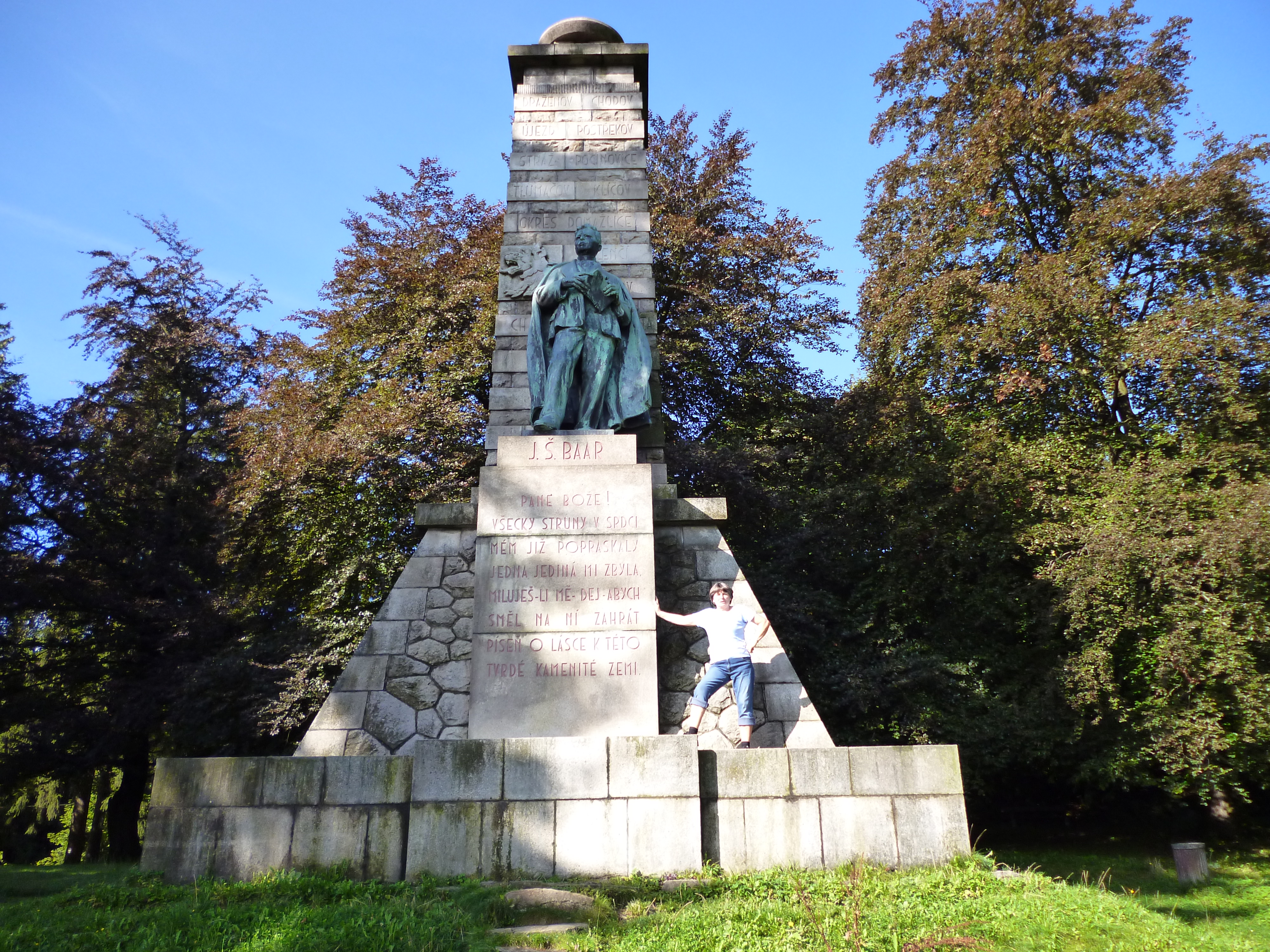 Pomník Jindřicha Šimona Baara na Výhledech v Klenčí pod Čerchovem